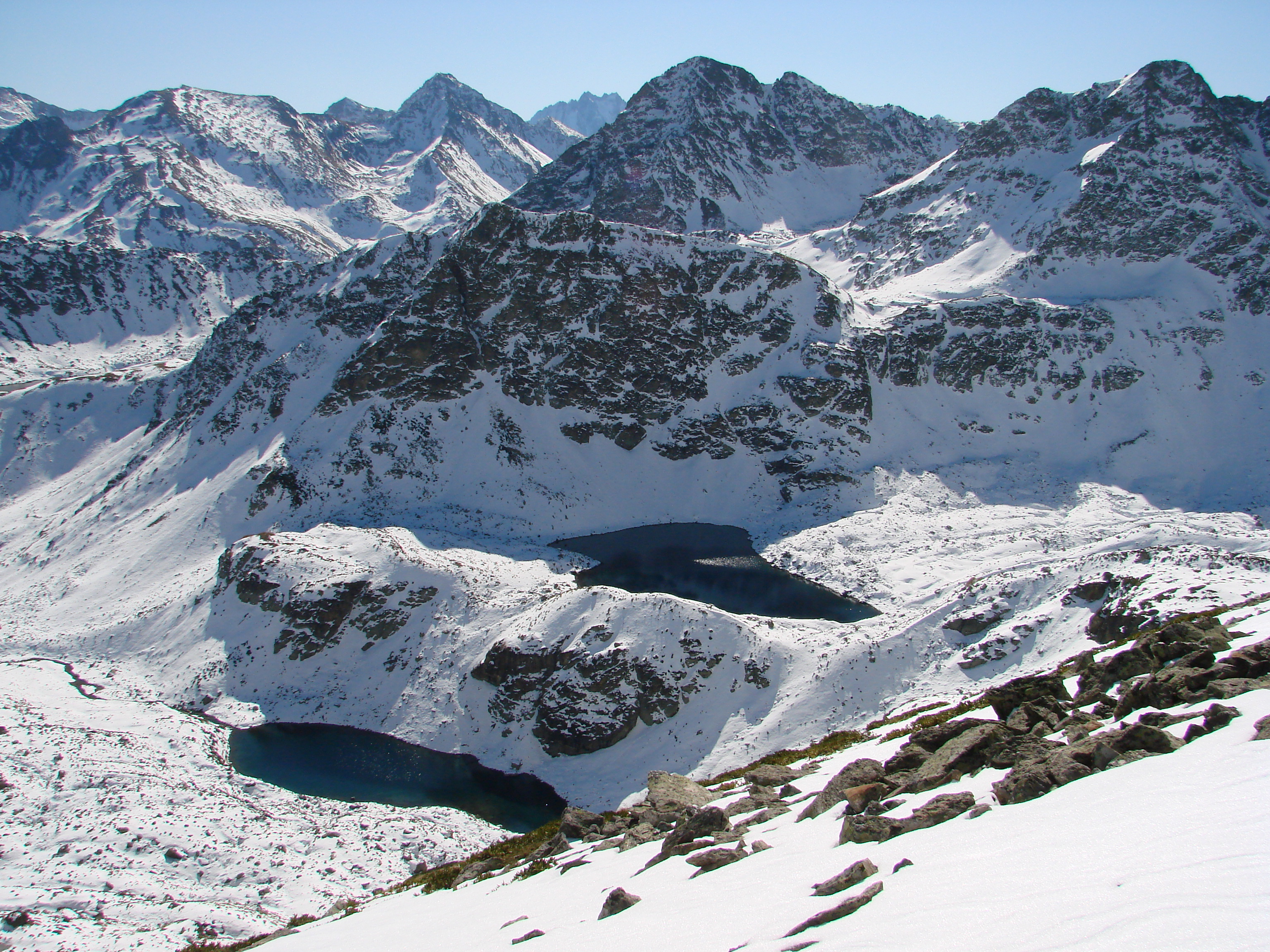 Дукинские озёра